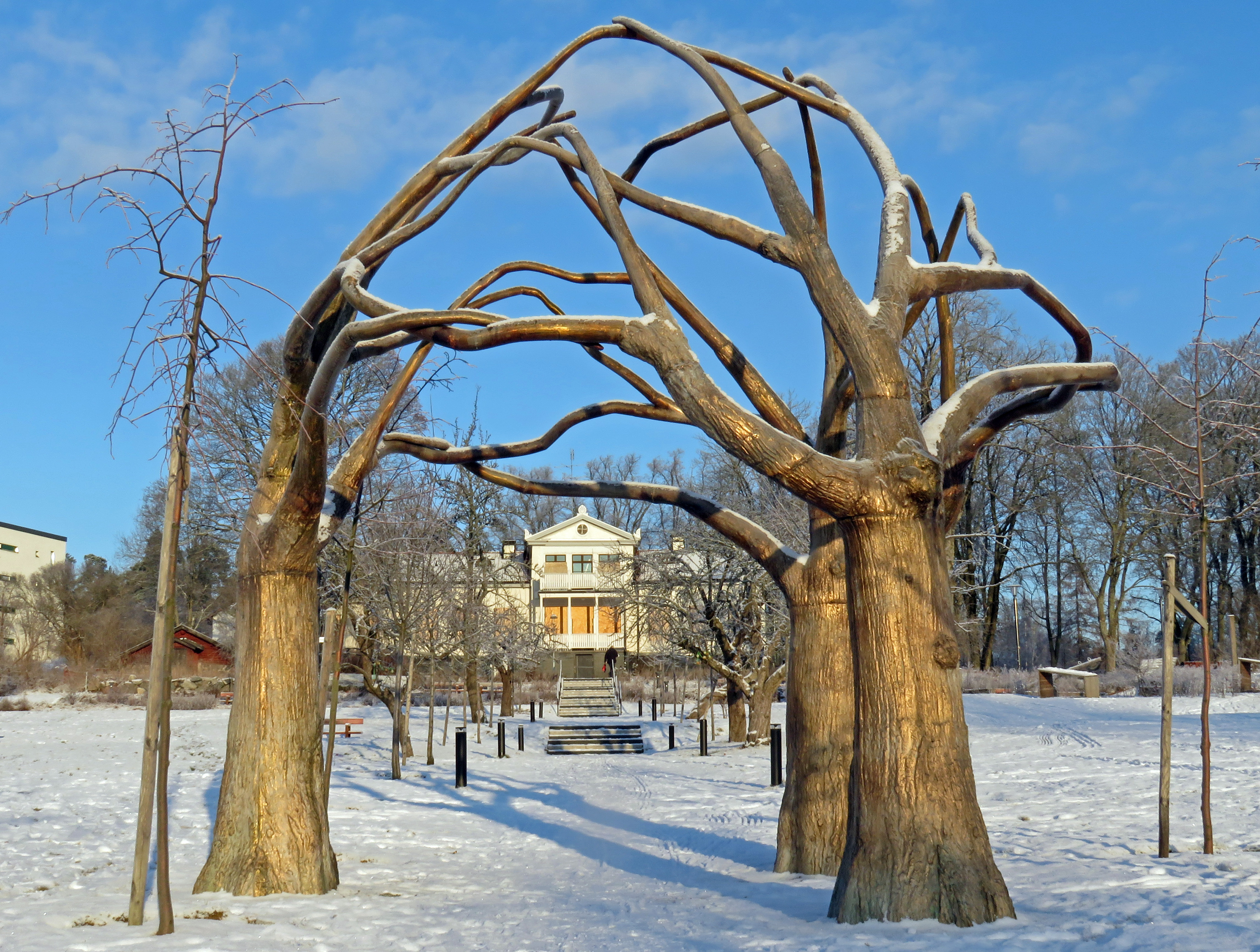 Lindarnas anatomi, av Christine Ödlund 2015